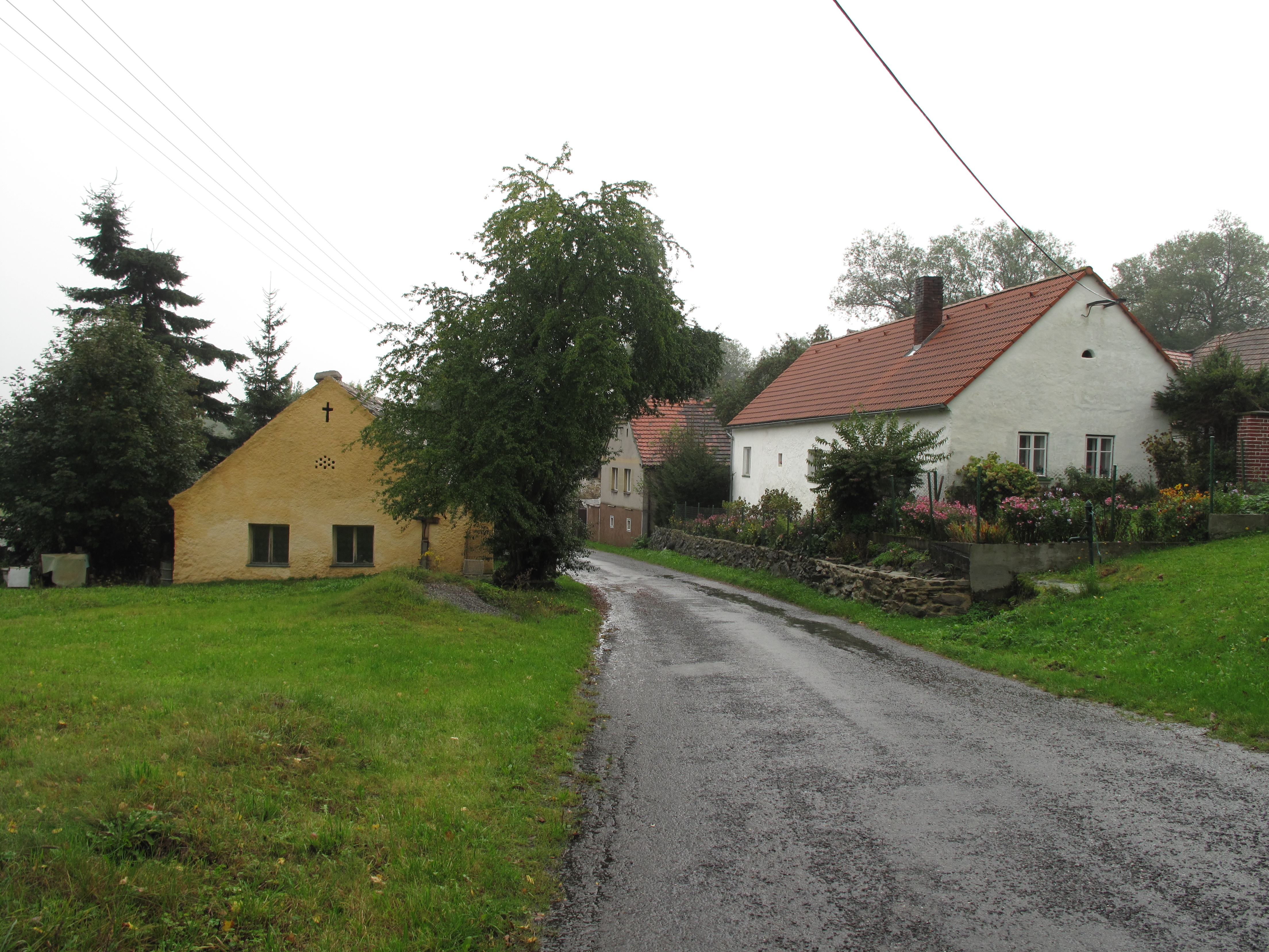 Žlutý dům v Mladoticích. Okres Strakonice, Česká republika.